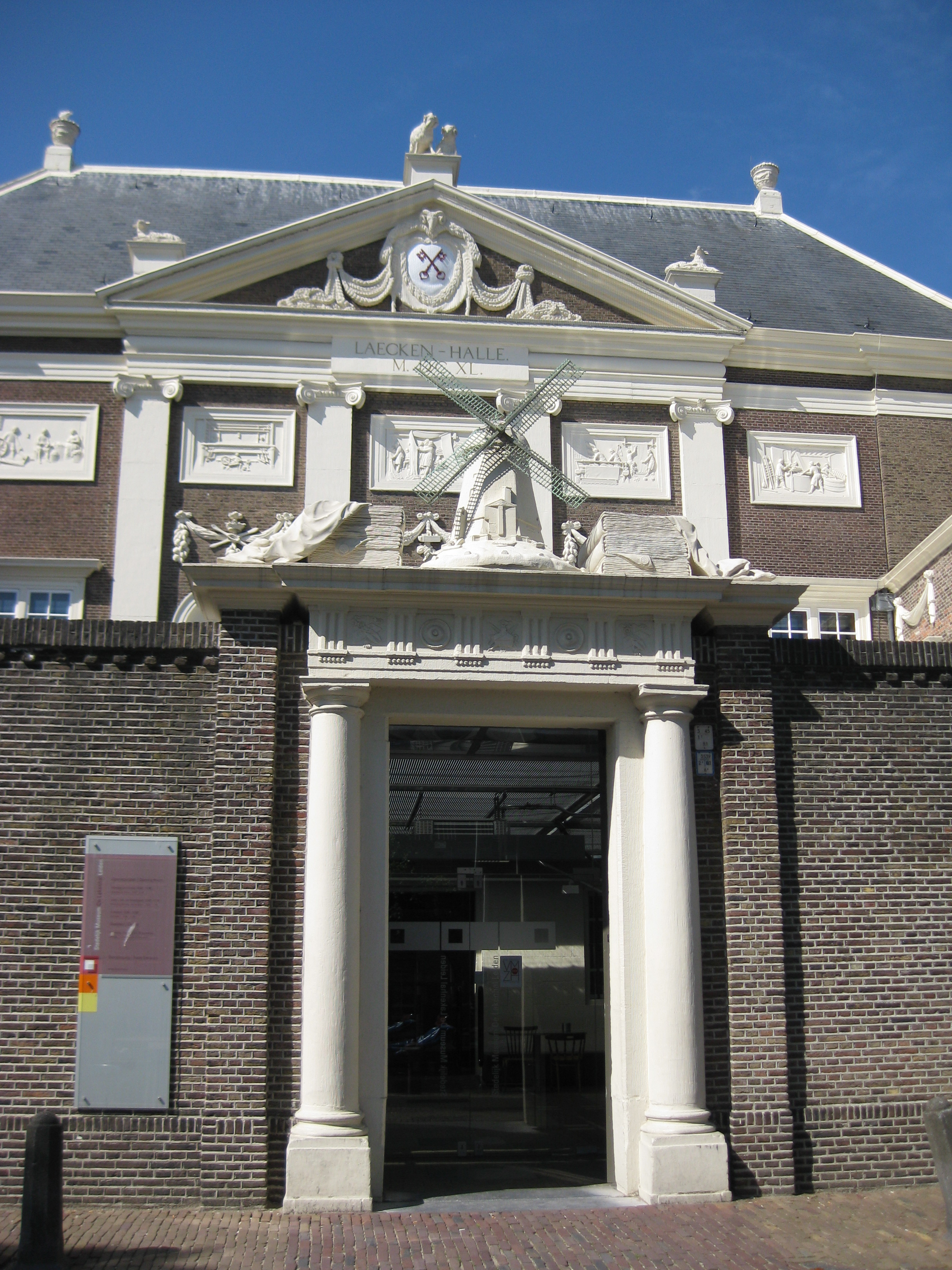 Stedelijk Museum De Lakenhal in Leiden